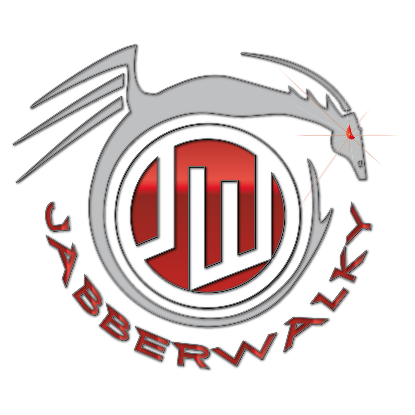 seit November 2009 offizielles Band-Logo von Jabberwalky